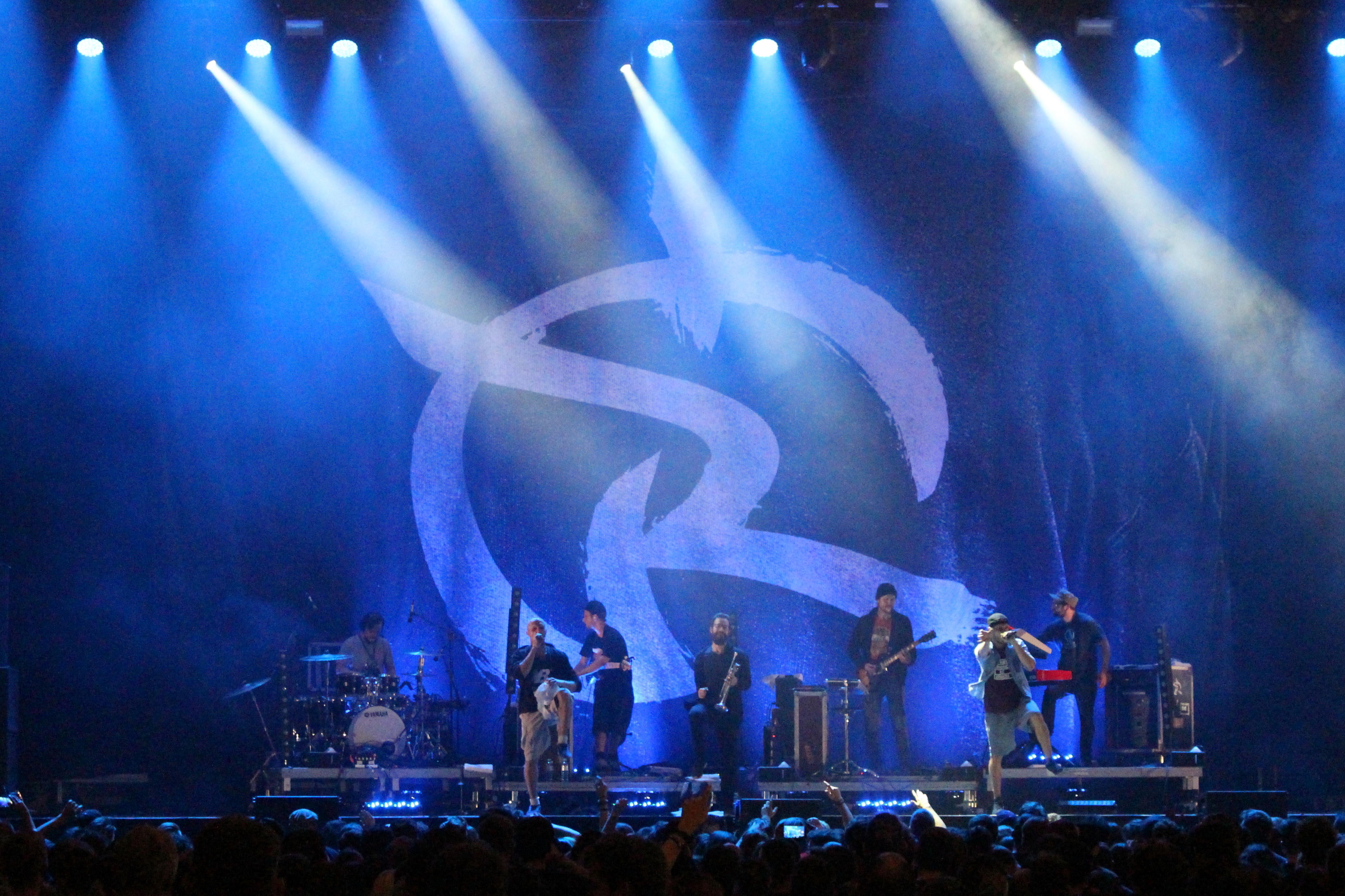 Festivalsommer This photo was created with the support of donations to Wikimedia Deutschland in the context of the CPB project "Festival Summer".